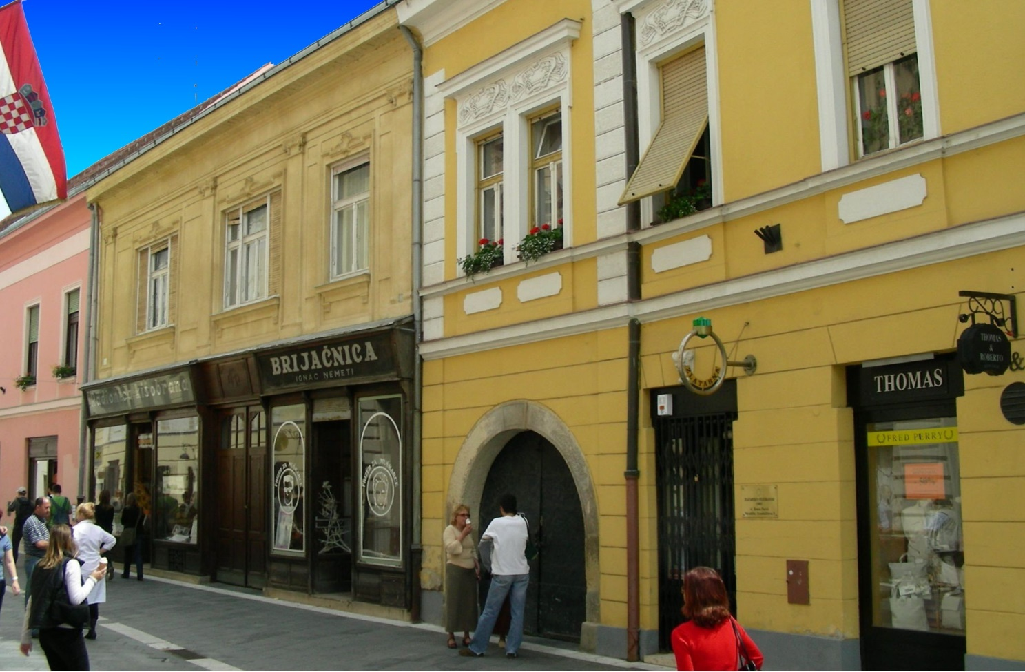 Gasse in der Altstadt von Varazdin